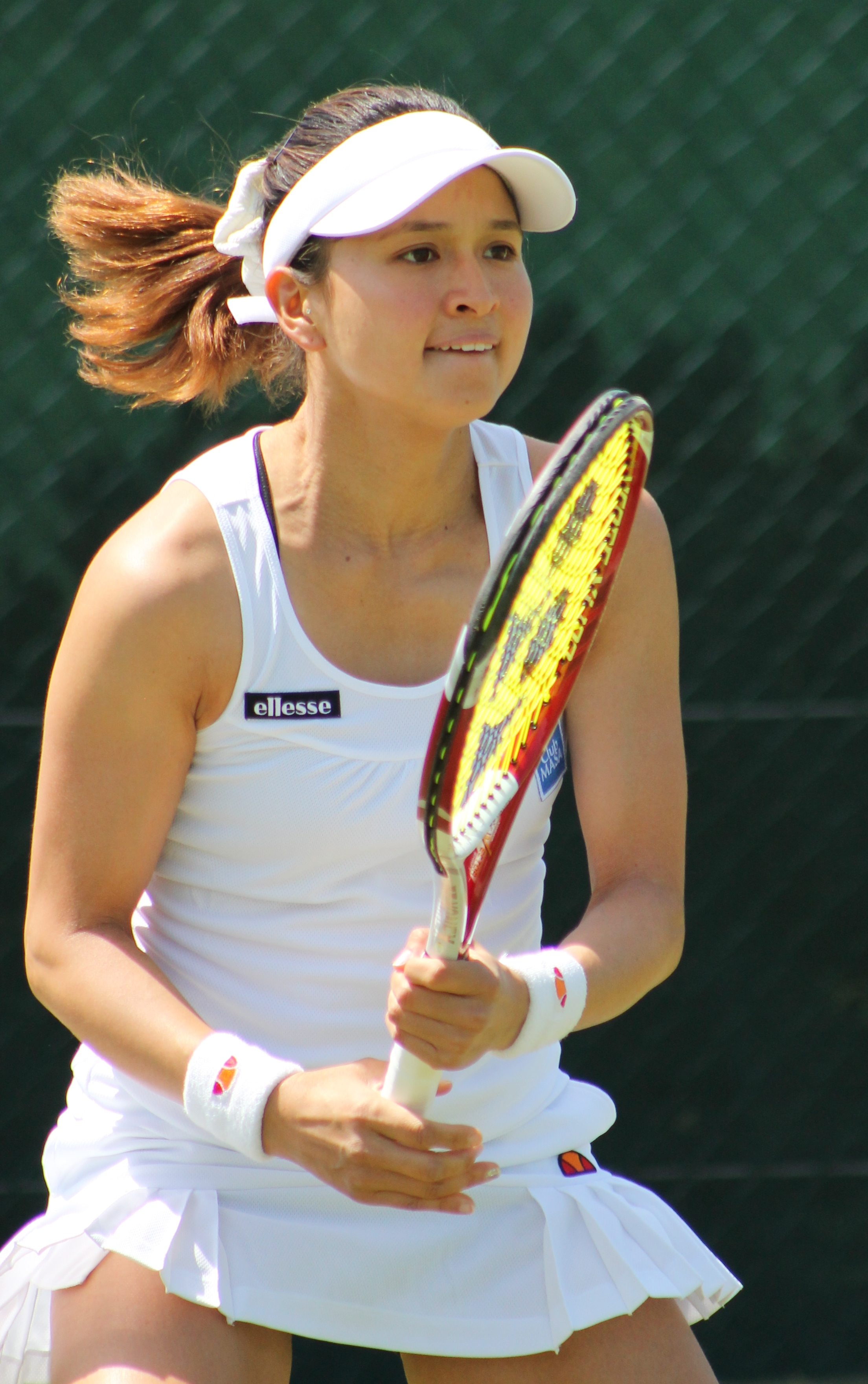 Sema E. WMQ14 (16)